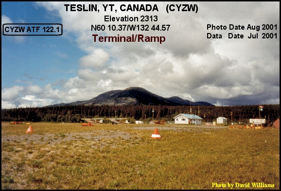 Terminal, Teslin airport, Yukon